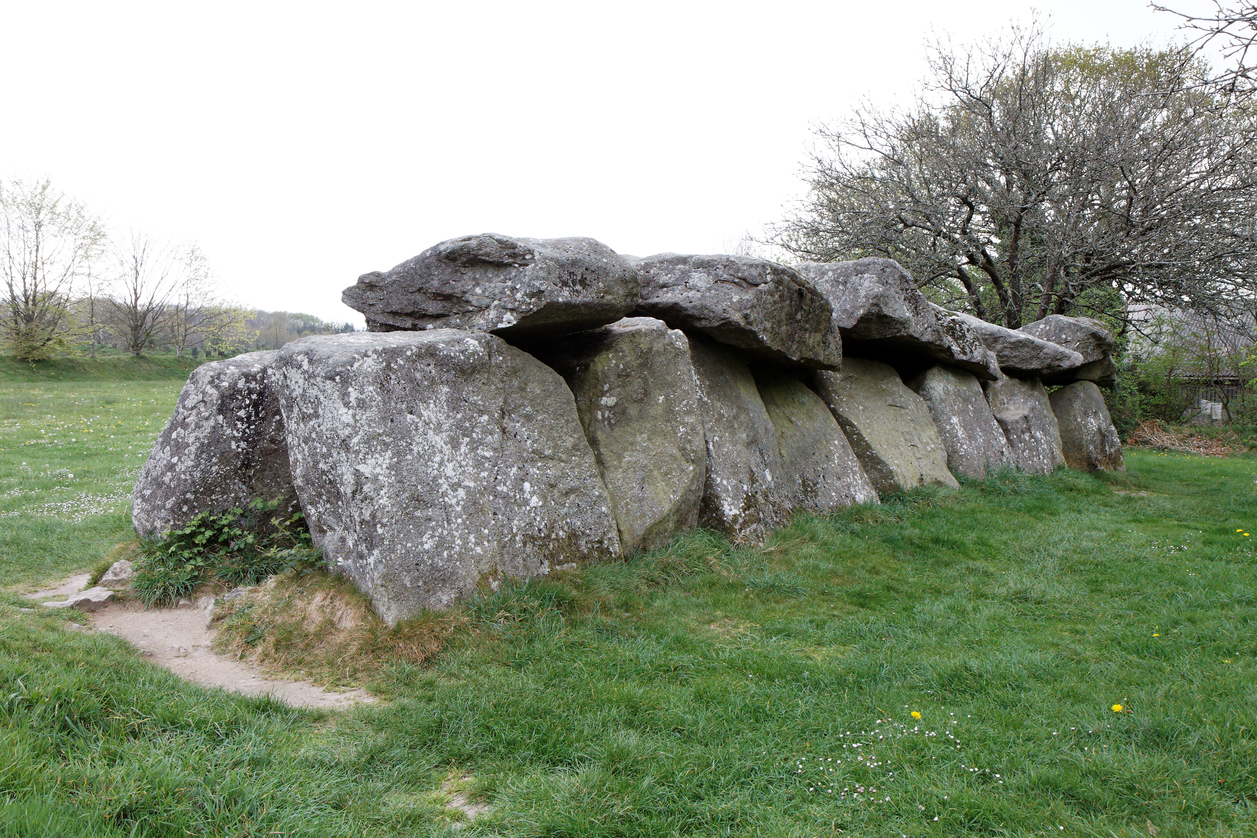 L'allée Couverte du Mougau-Bihan à Commana dans le Finistère. .